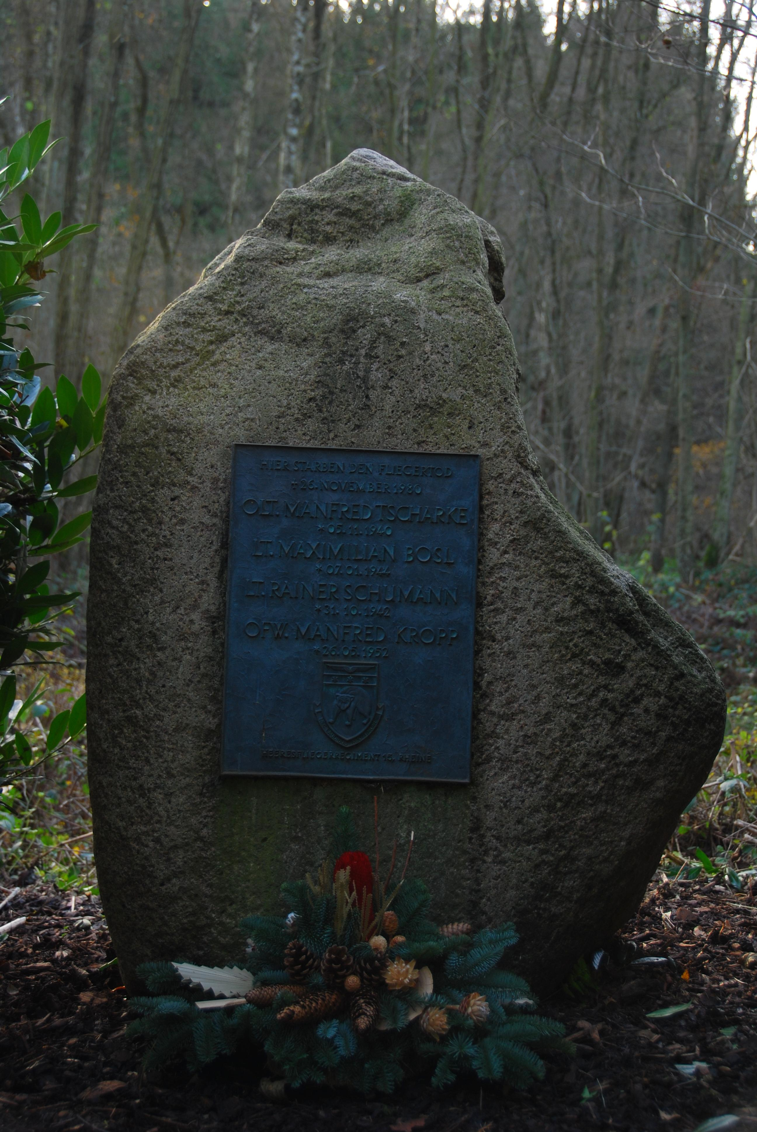 Gedenkstein in Wippenkausen